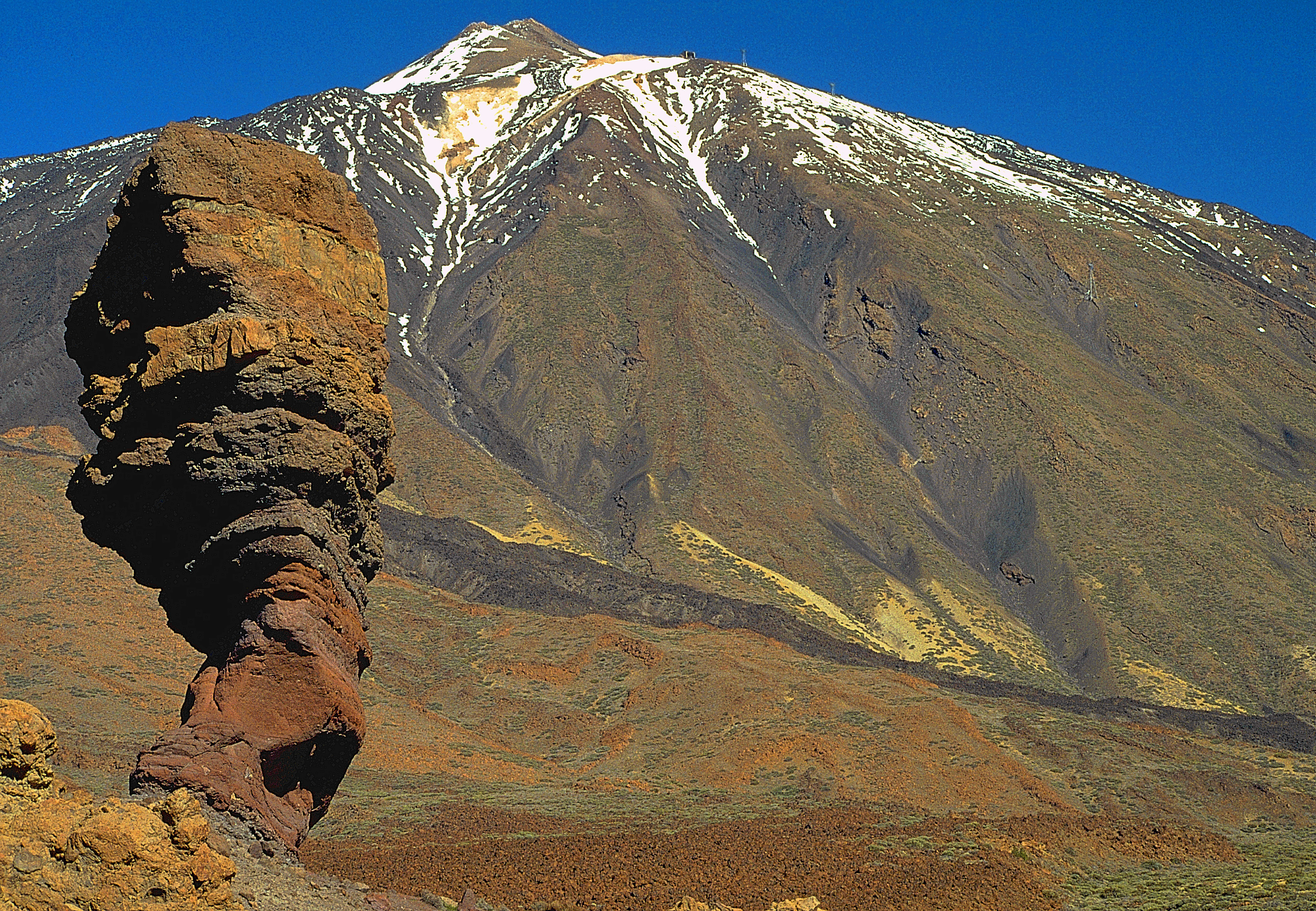 Die kanarischen Inseln sind seit Jahren ein beliebtes Ferienparadies. Besonders Teneriffa leidet unter den Besuchanstrum der in die zigtausende geht. Gott sei Dank verbringt der Großteil der Touristen seinen Urlaub an den Küstenregionen. So kann man zu bestimmten Zeiten Blicke wie diesen in den frühen Morgenstunden oder am Abend fast noch allein geniesen. Das Bild zeigt den höchsten Berg Spaniens, den 3718 m hohen Pico del Teide. Der imposante Felsen im Vordergrund ist der Los Roques. Fotografiert mit Canon EOS 5 und 28-135mm IS Canon Objektiv & Polfilter. Digitalisiert auf Kodak Photo-CD. EBV mit PSP 5.